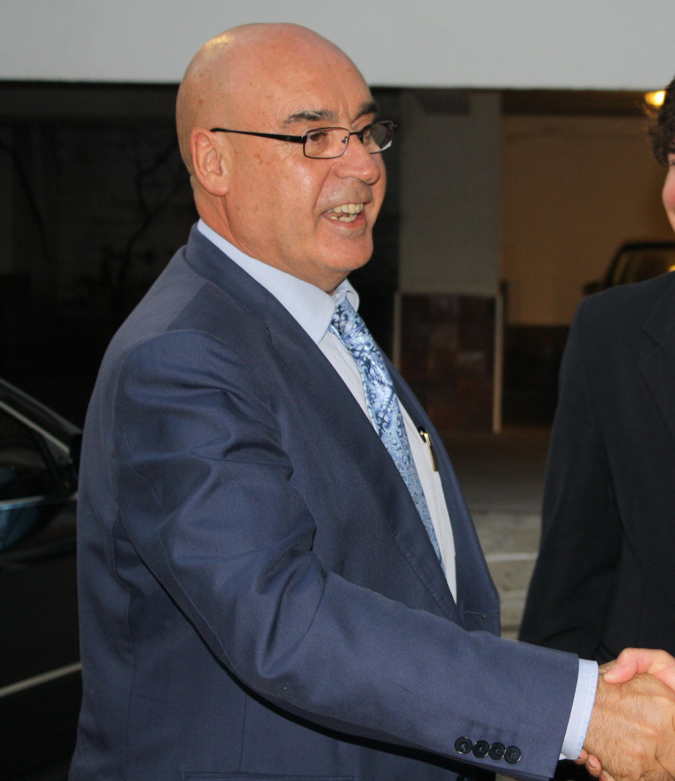 El Presidente del Senado, Javier Rojo, antes de impartir una conferencia en el Colegio Mayor Elías Ahúja de Madrid.